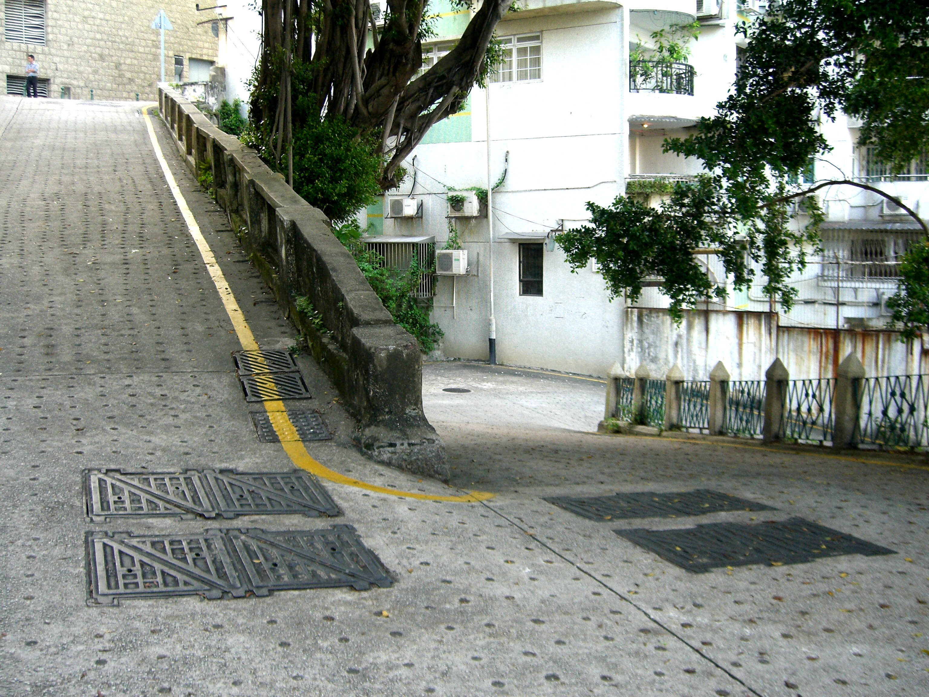 Calçada do Bom Parto